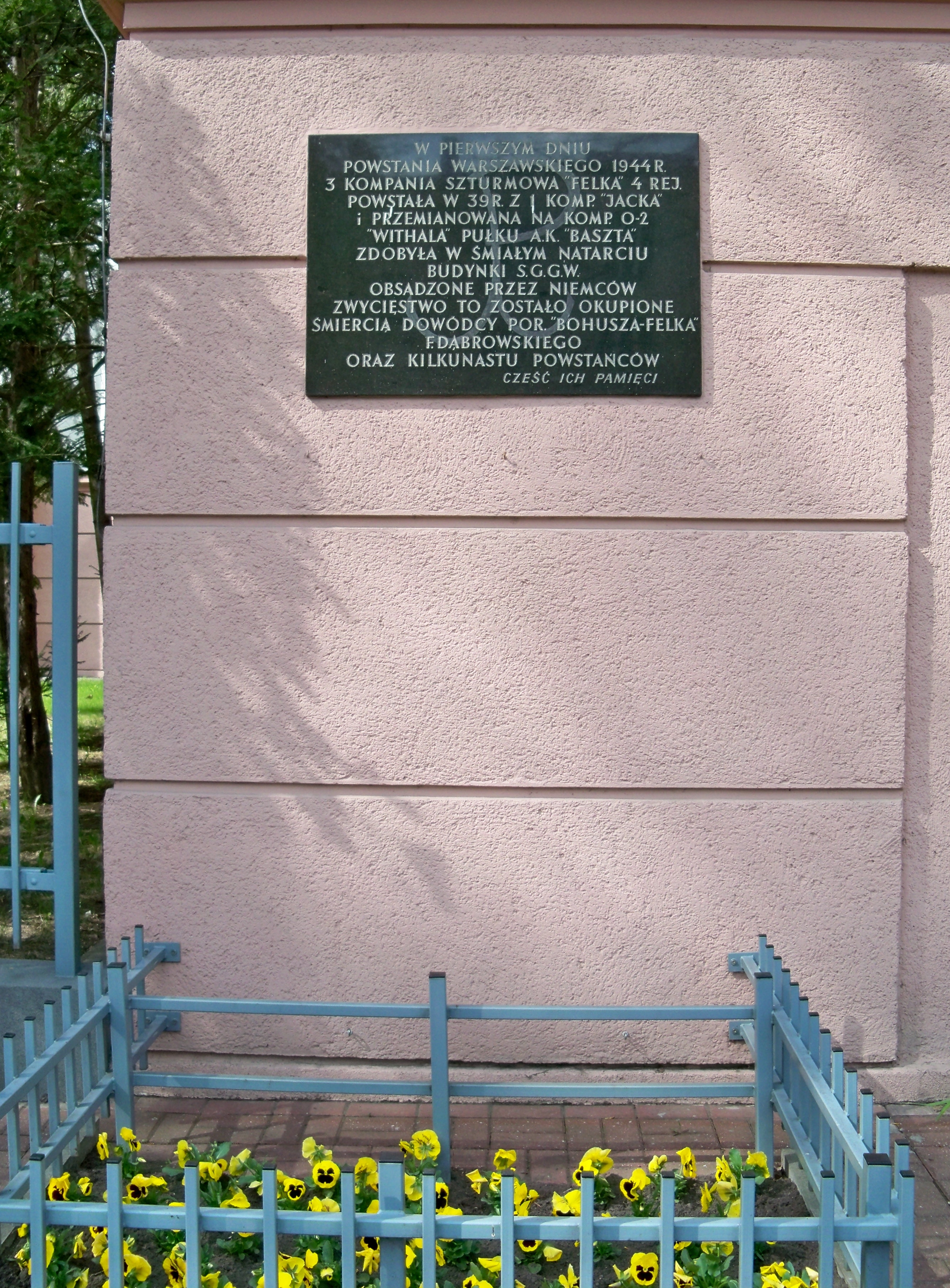 Tablica na gmachu przy Rakowieckiej 28 w Warszawie upamiętniająca powstanie warszawskie